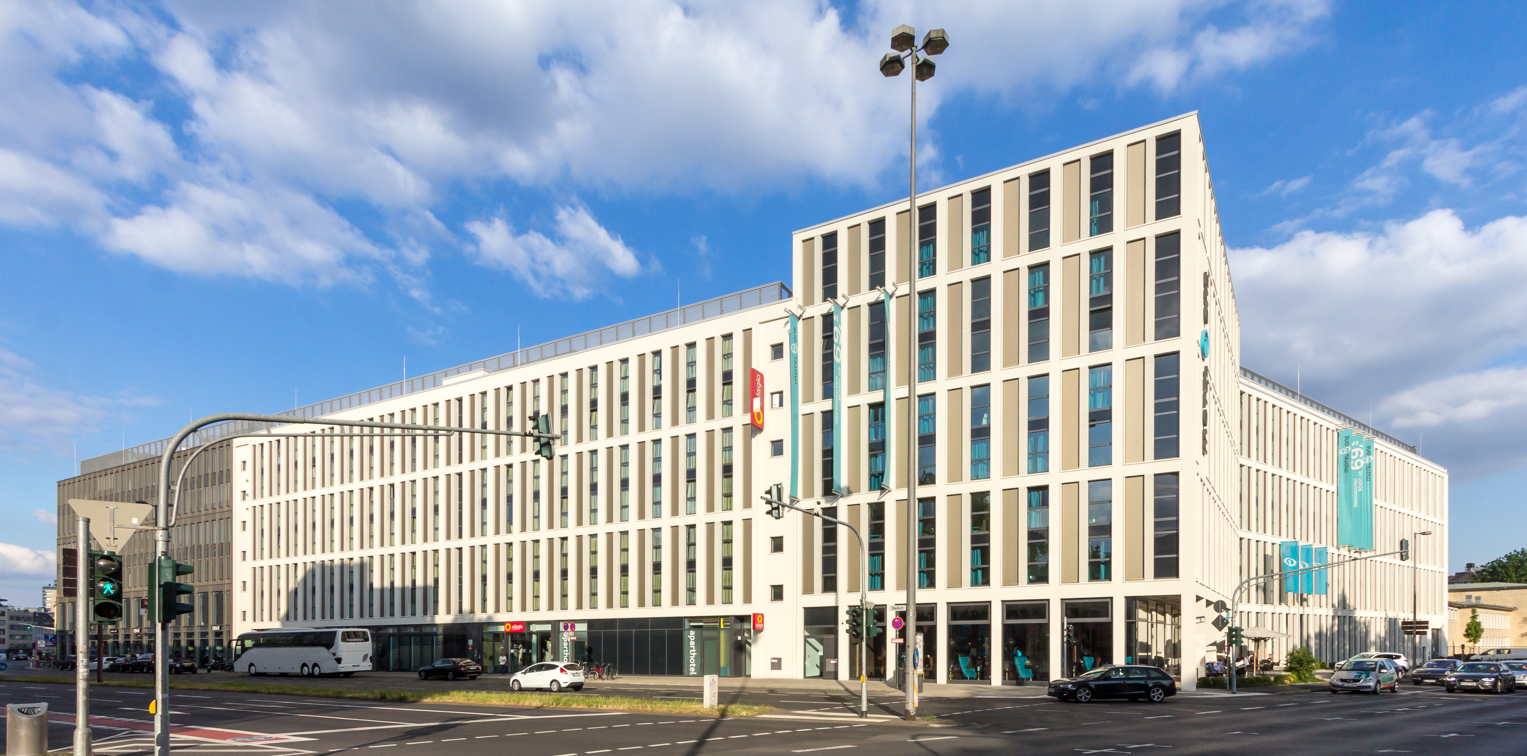 Adagio Aparthotel Köln City und Motel One Köln-Waidmarkt